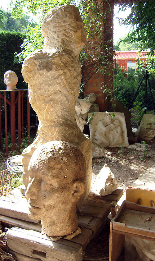 Arbeiten der Bildhauerin Ingeborg Hunzinger im Sommeratelier ihres Wohnhauses, Fürstenwalder Allee 12, Berlin-Rahnsdorf, 2008